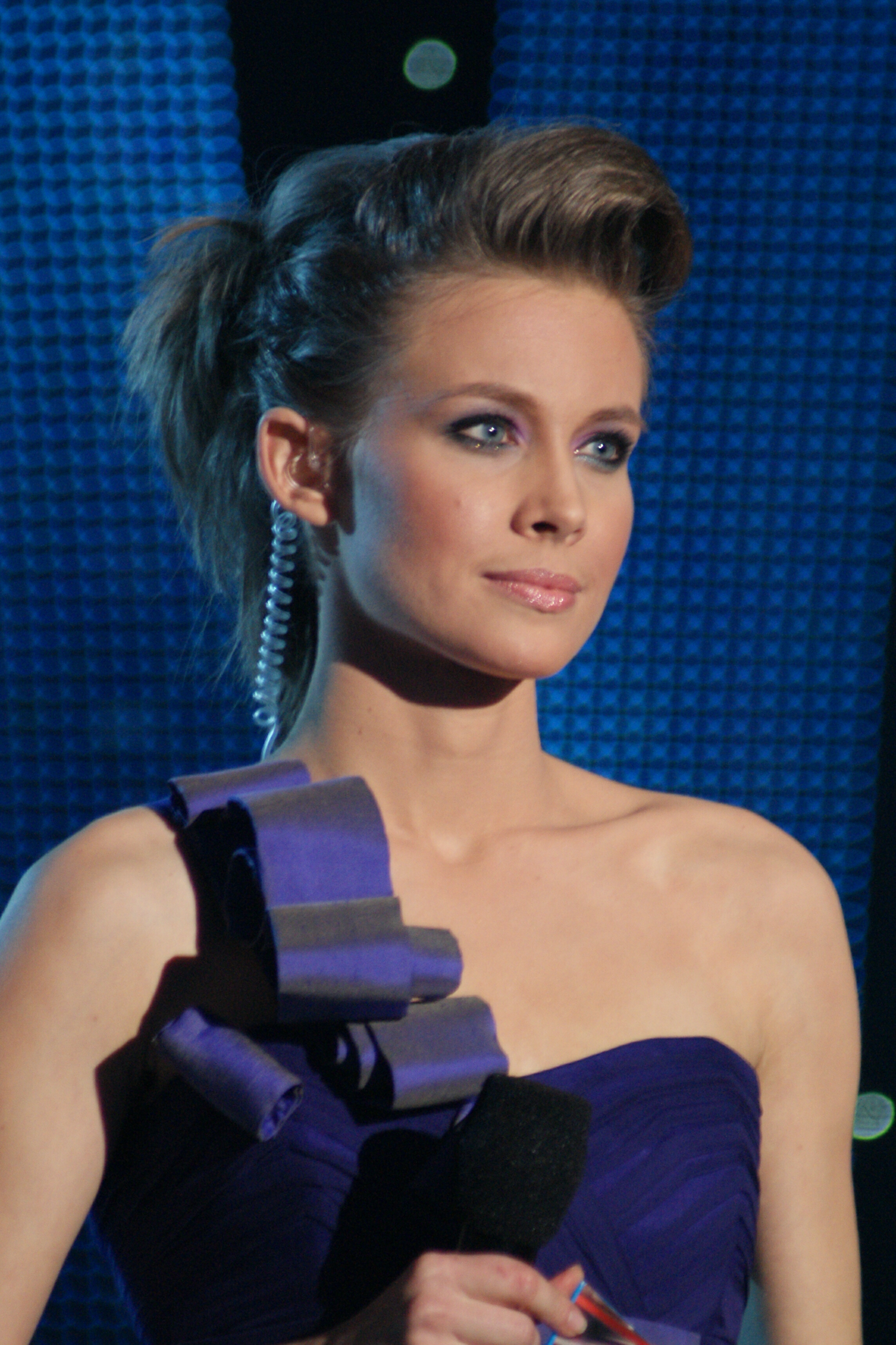 Aleksandra Rosiak